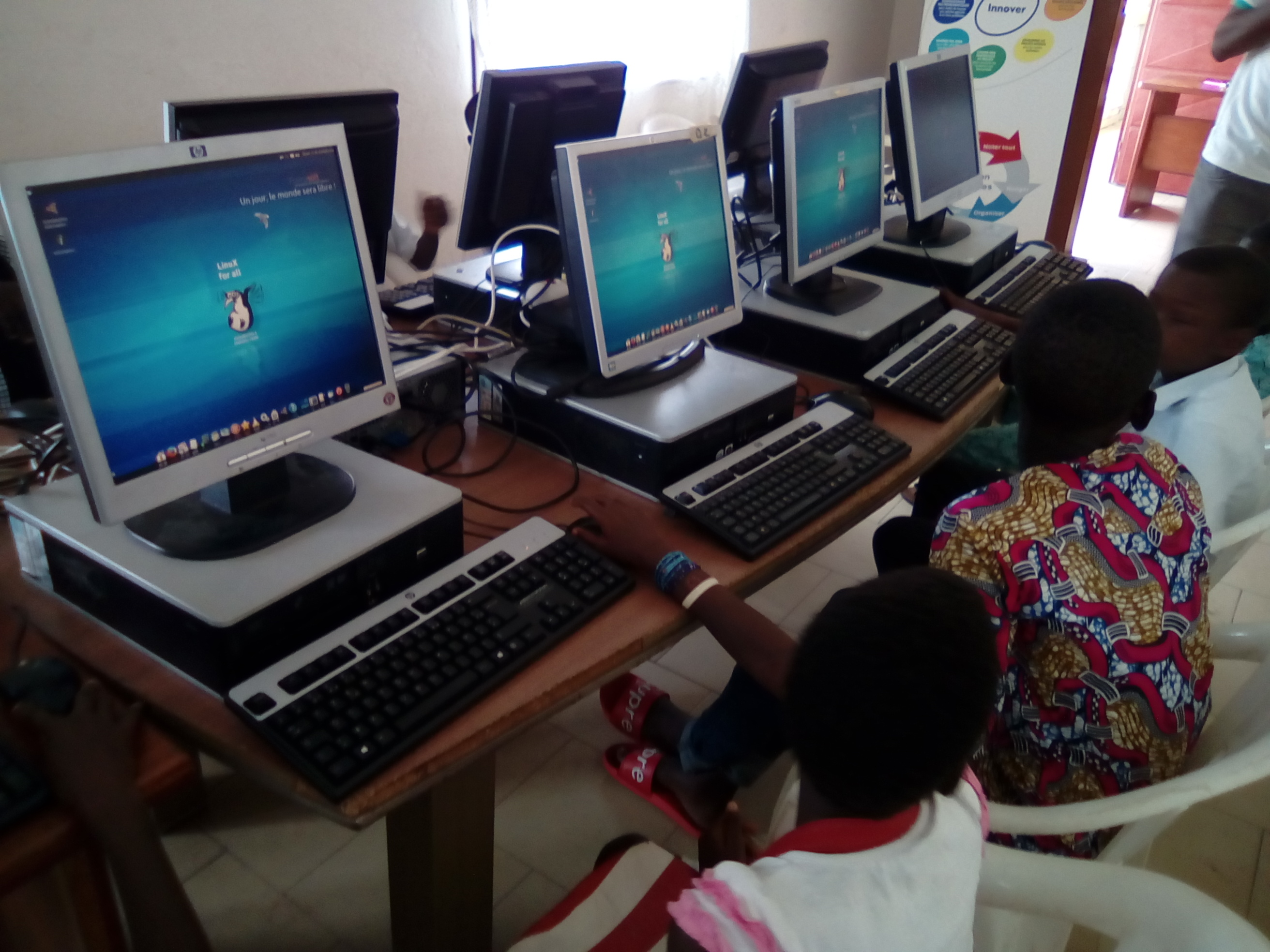 Atelier de formation des enfants de moins de 15 ans sur le logiciel Scratch, organisé le samedi 10 juin 2017 par BLOLAB, 1er FabLab du Bénin. Toutes les machines sont équipées d'Emmabuntüs.